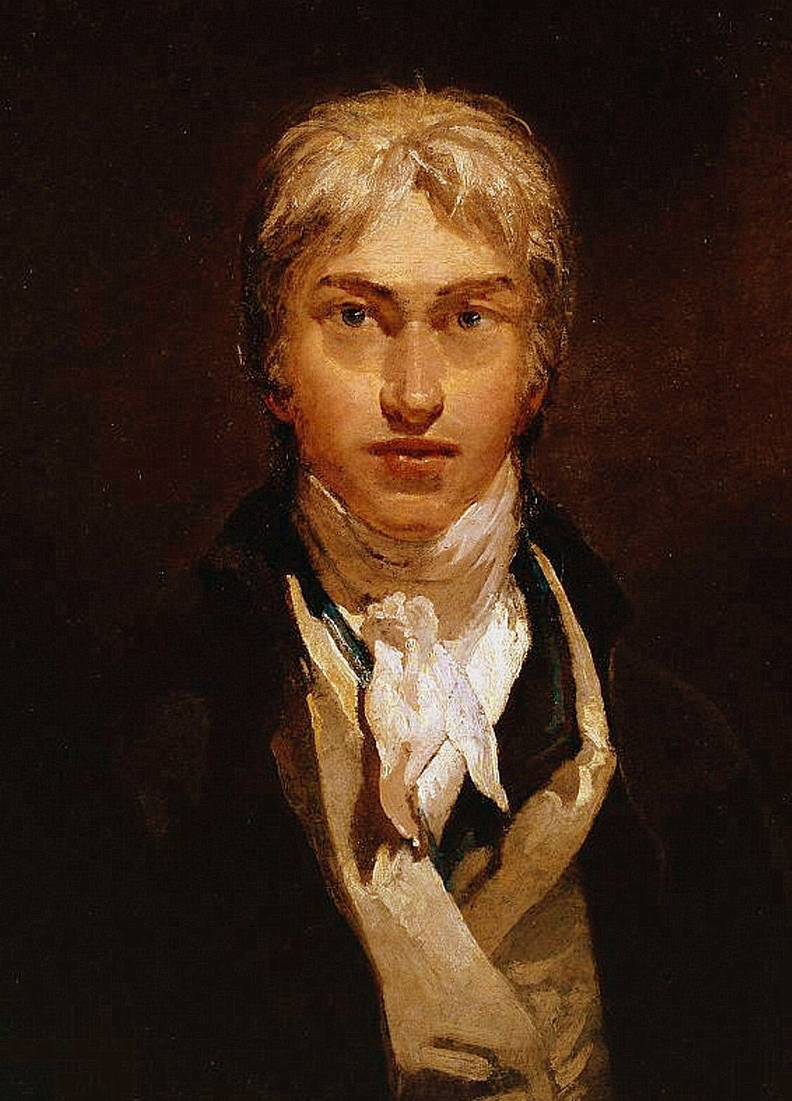 Self-portrait